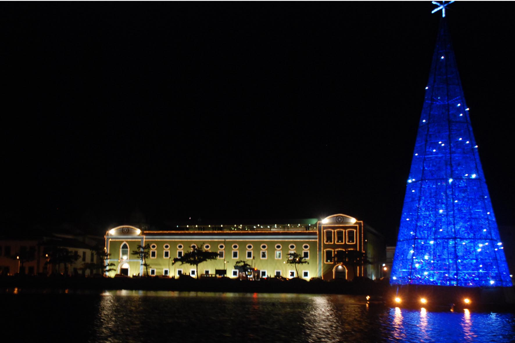 Shopping Center Paço Alfândega - Recife, tomada noturna, com iluminação natalina.